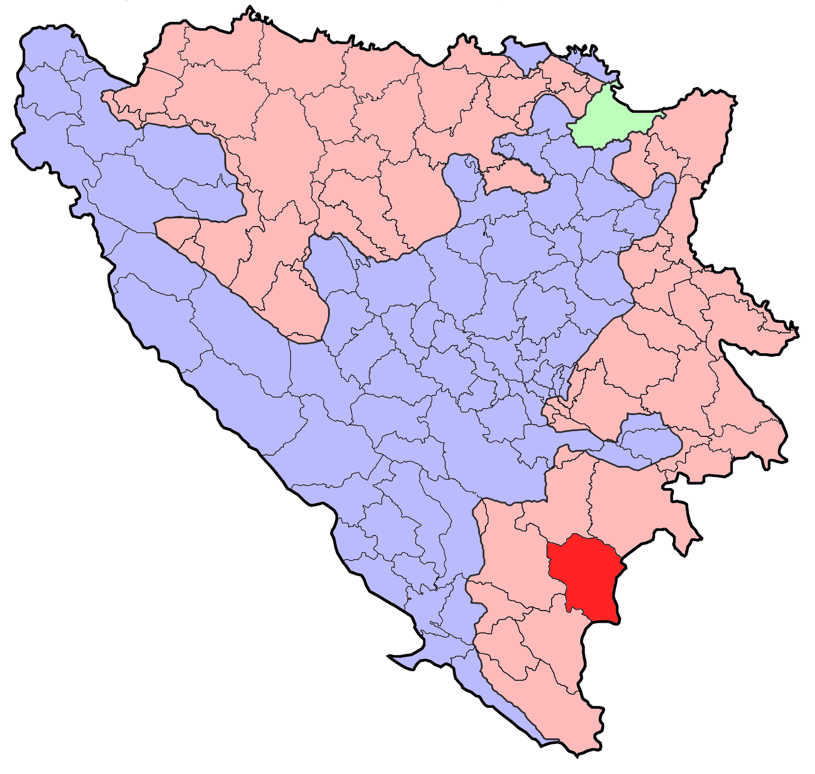 Republika Srpska (BiH) municipality